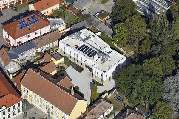 Zene Háza Sárvár - légi fotó